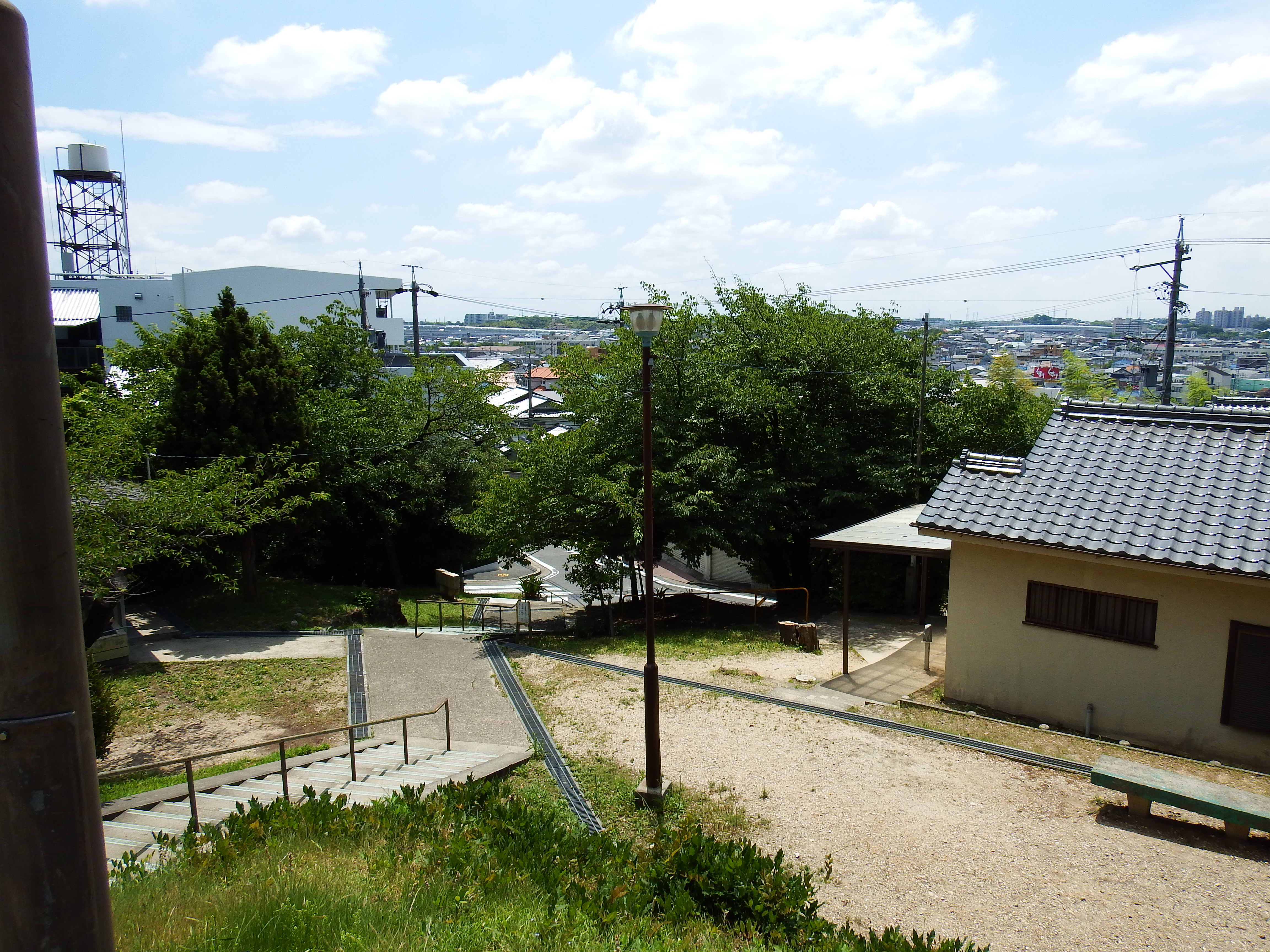 善祥寺砦2